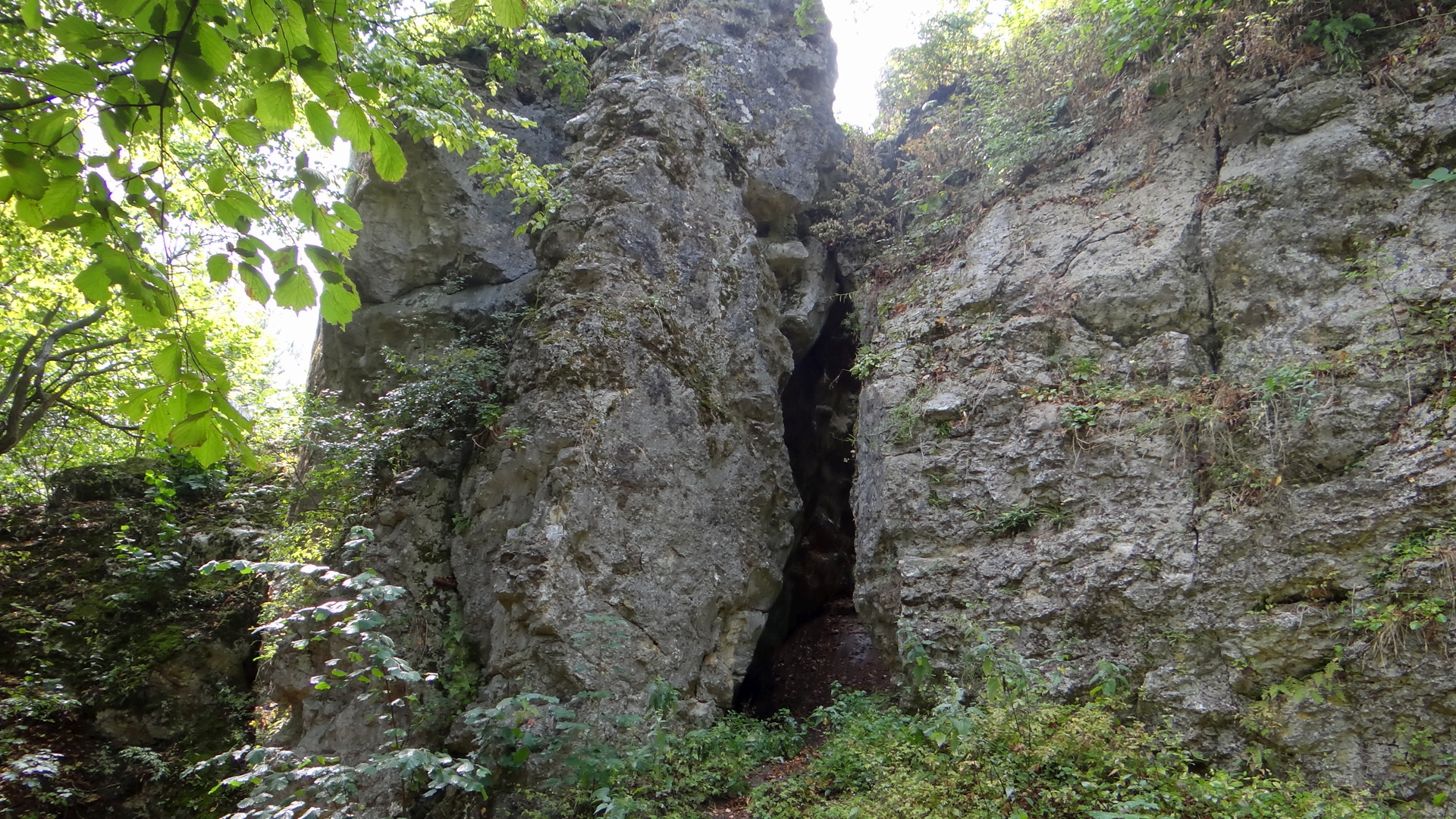 Komin Prawej Nogi Baby w skałach Dudnik w Podlesicach